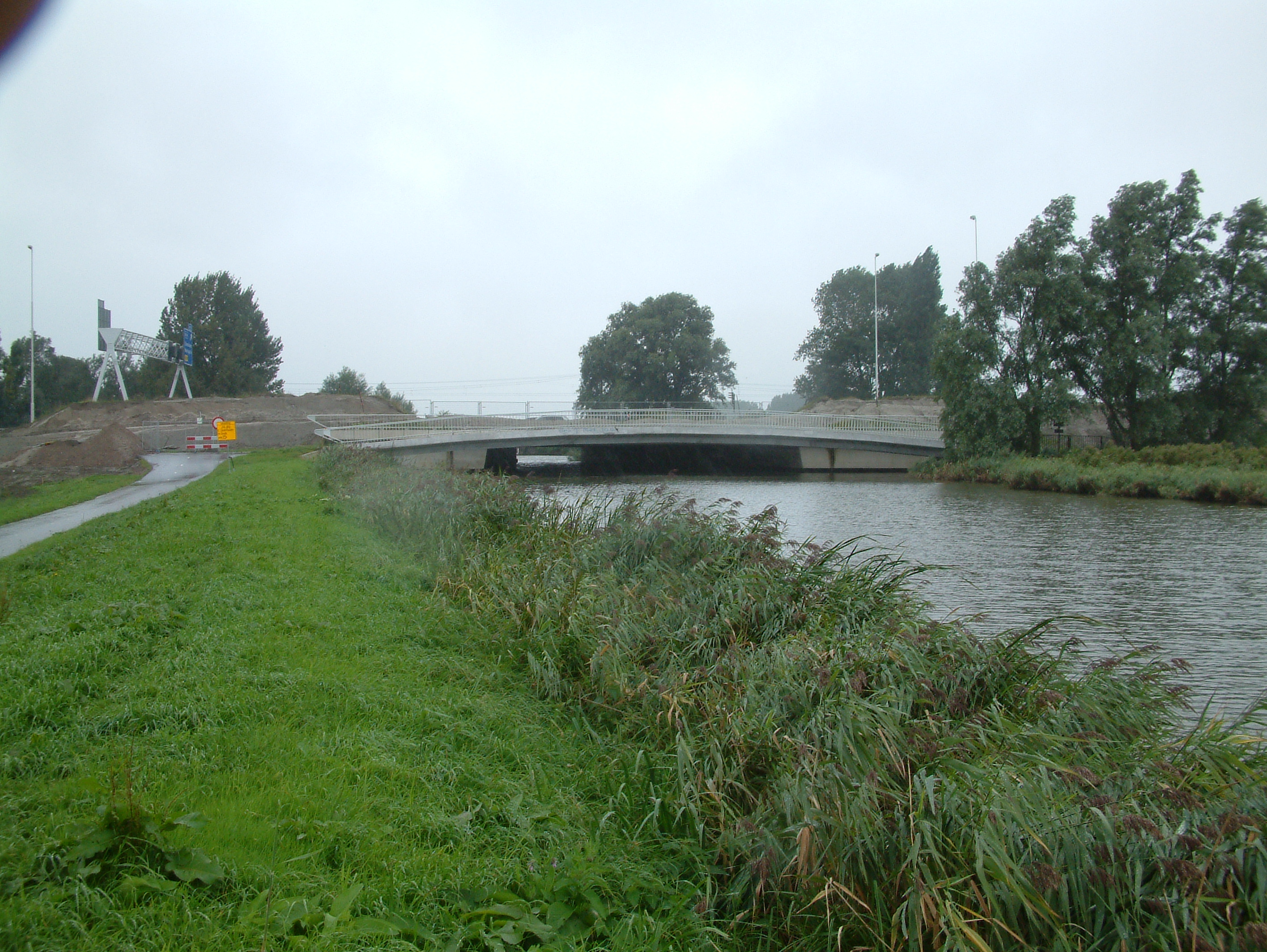 Bruggen over de Rotte